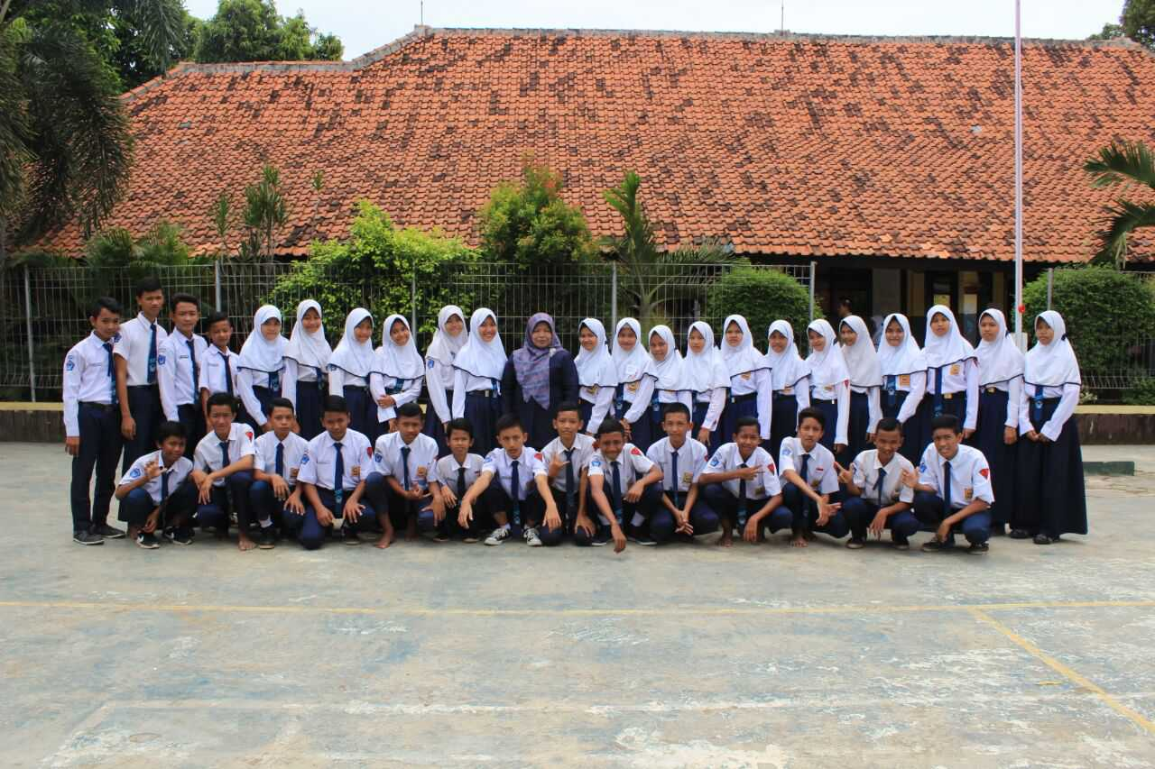 Siswa-siswi SMP Negeri 2 Kotabaru, Karawang, Jawa Barat, Indonesia